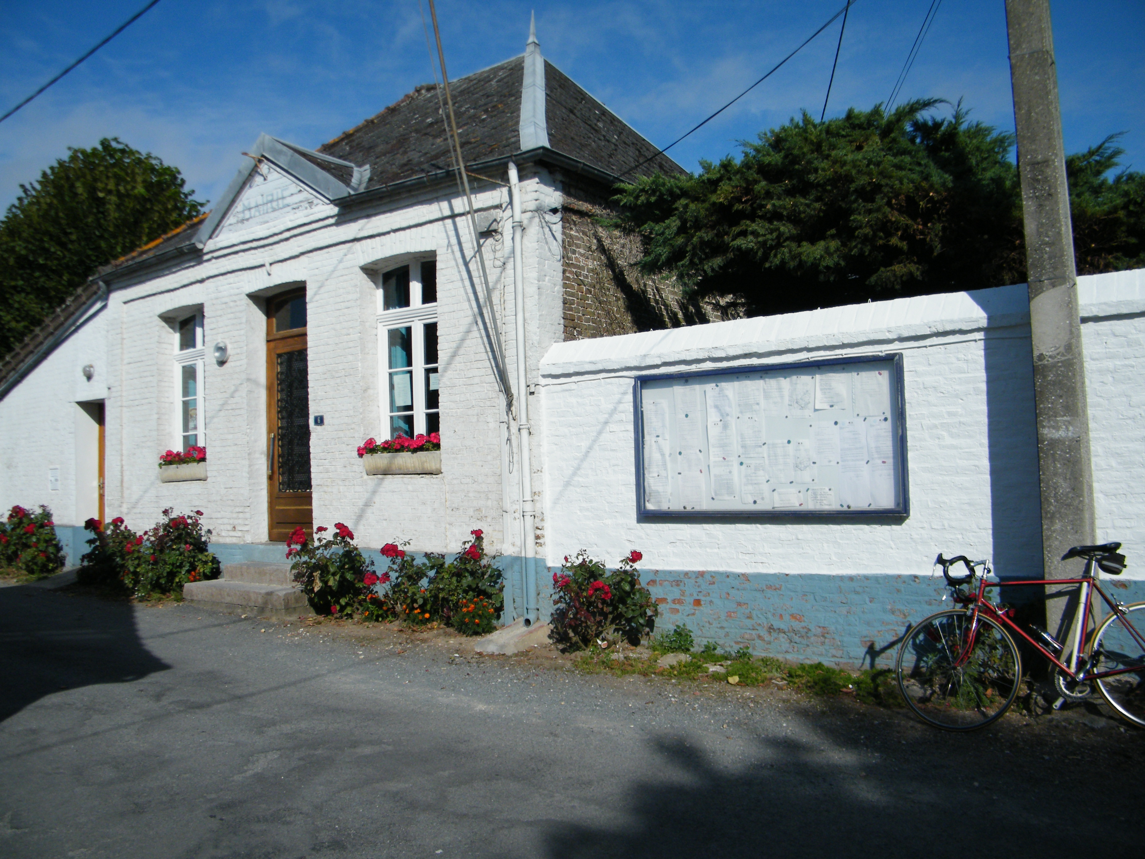 Nempont (Pas-de-Calais, Fr), mairie.